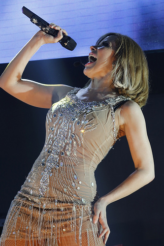 Gloria Trevi una de las cantantes latinas mas importantes.